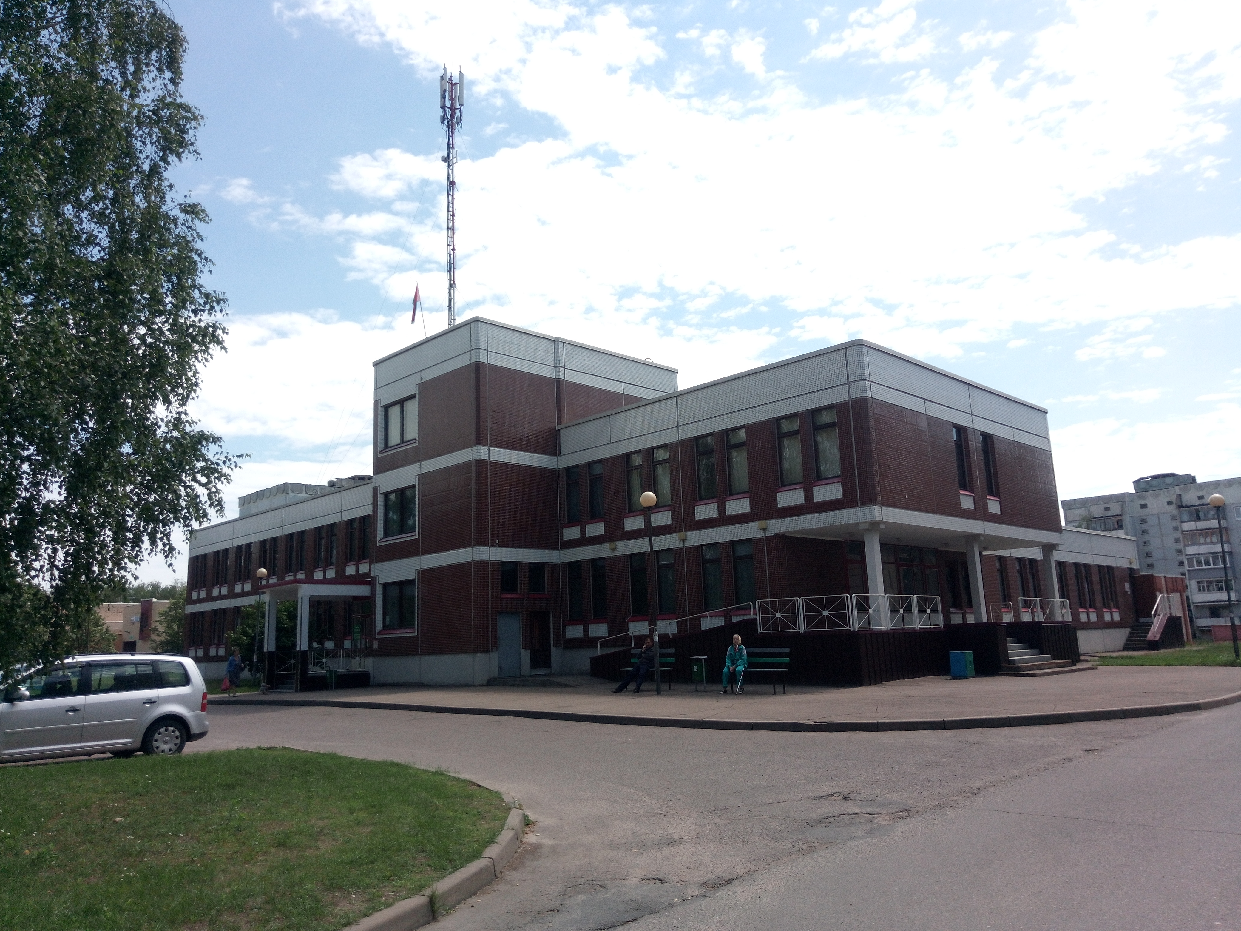 Паліклініка №1